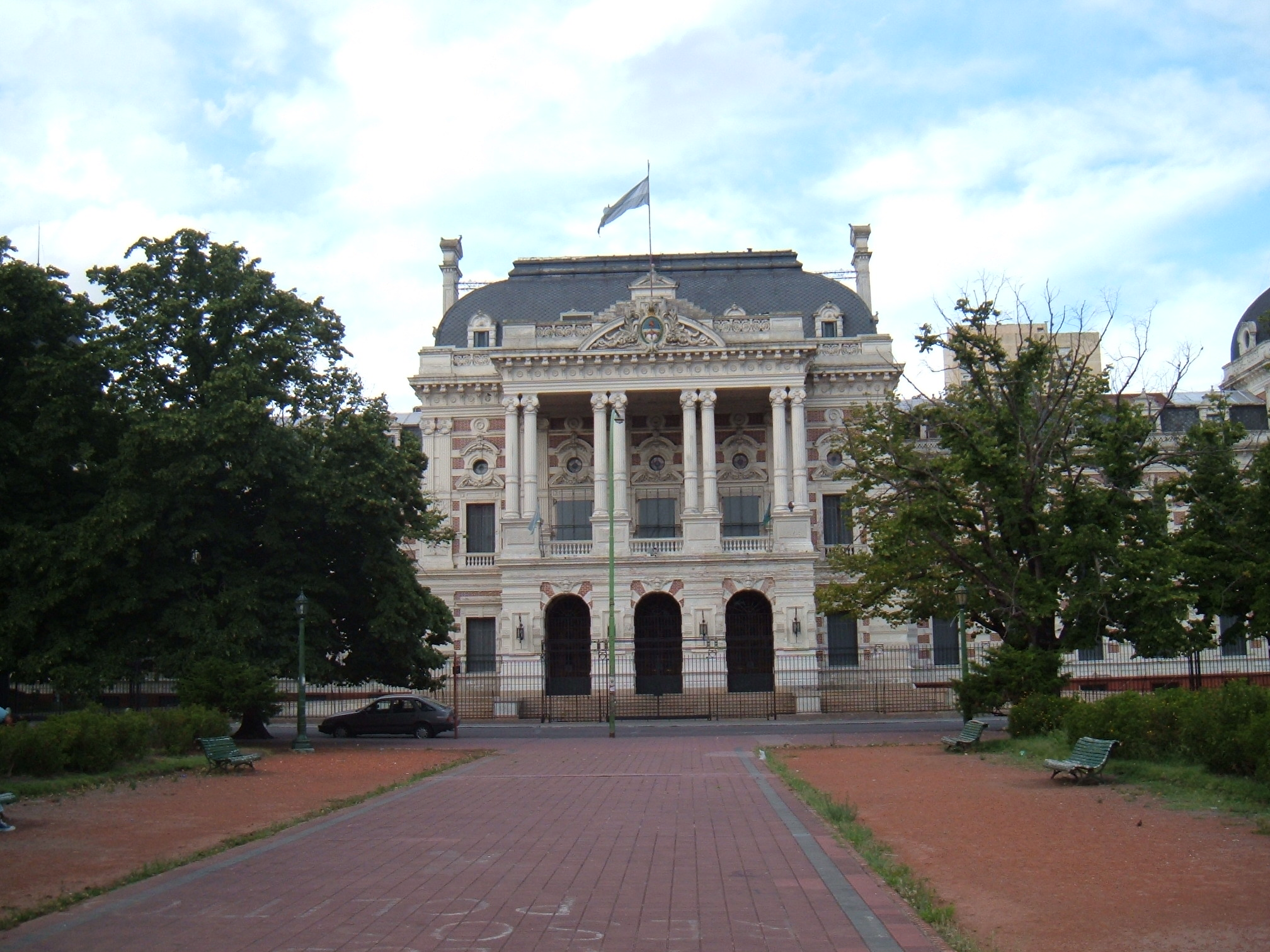 Fotógrafo: Sergio Carmona. (2005) El autor autorizó publicarla con licencia GFDL.